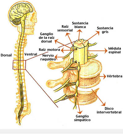 lesion de medula